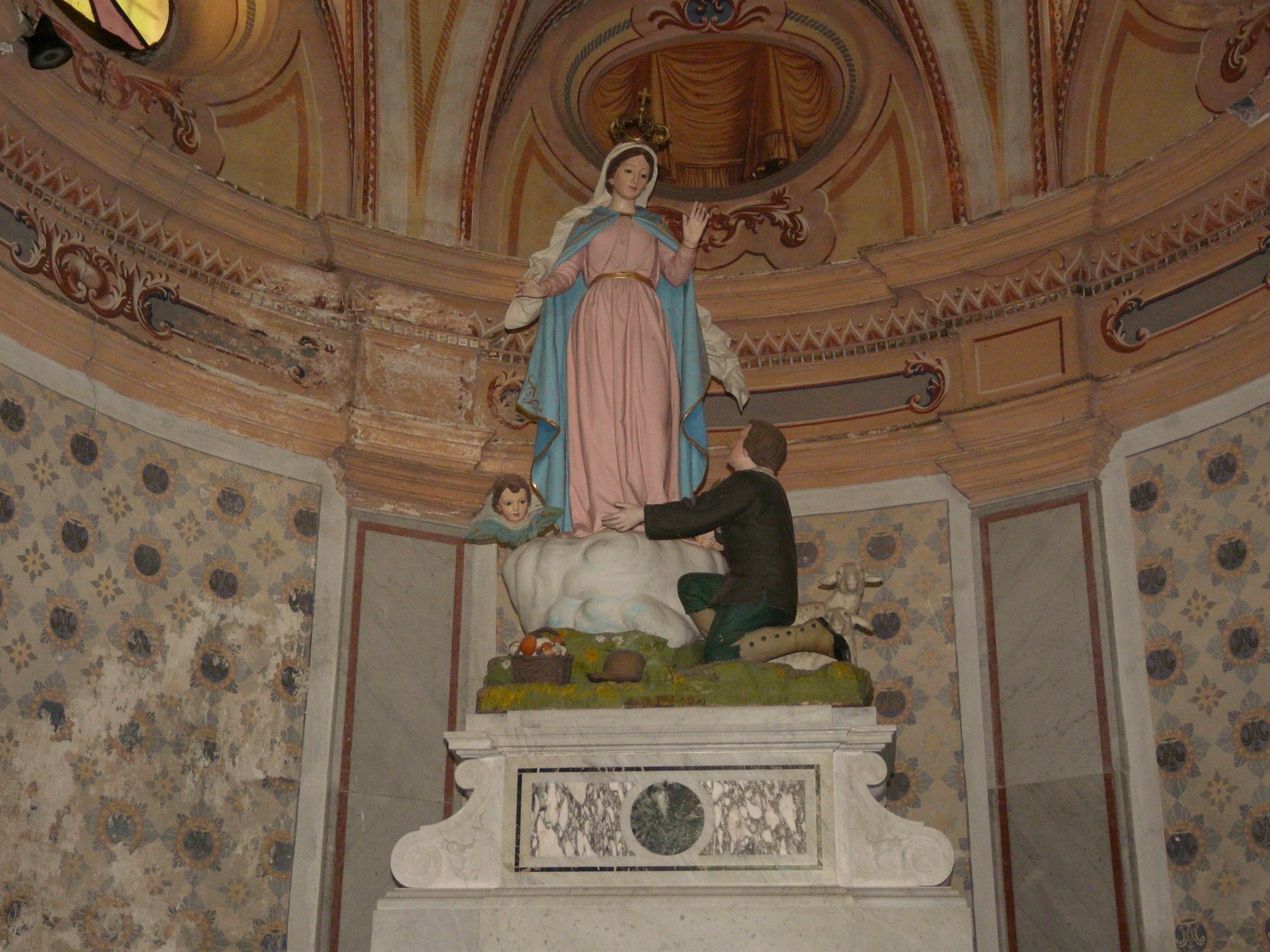 Raffigurazione scultorea dell'apparizione mariana del Santuario di Nostra Signora del Bosco, Lumarzo, Liguria, Italia